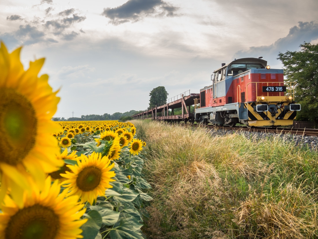 Suzuki tehervonat Nyergesújfalu és Tát között